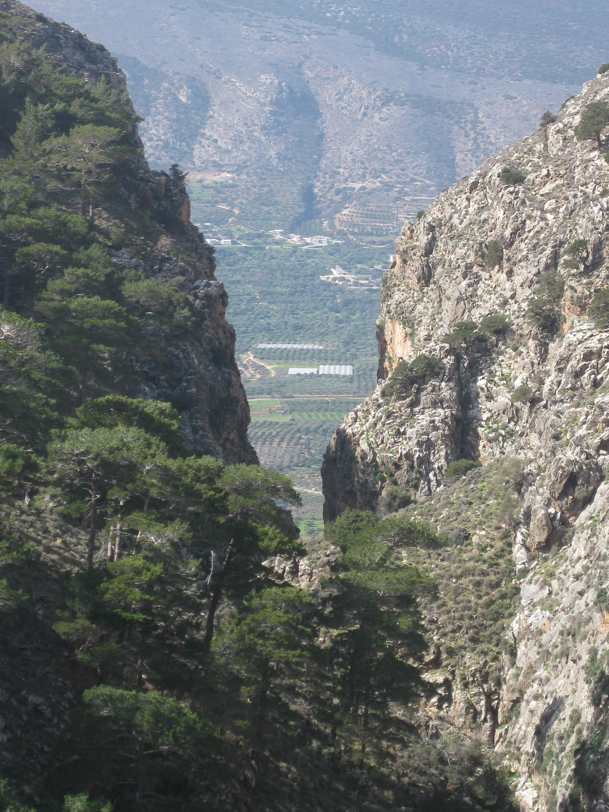 Φαράγγι του Χα στη Θρυπτή This is a photography of Natura 2000 protected area with ID GR4320005